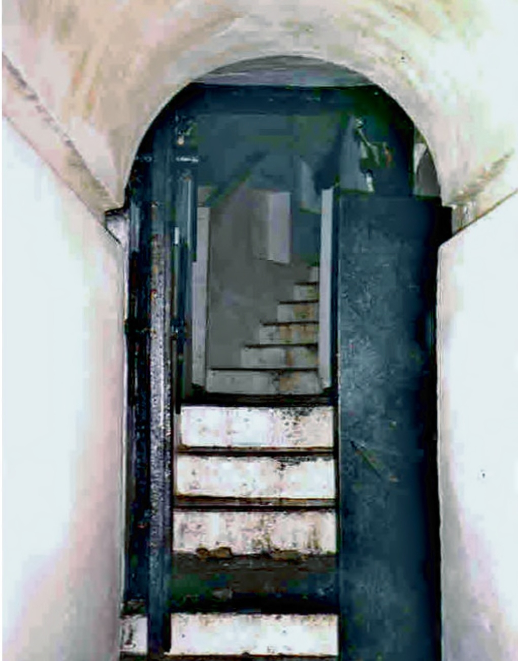 Galleria di Purgessimo, Sezione del Fante di Cividale del Friuli